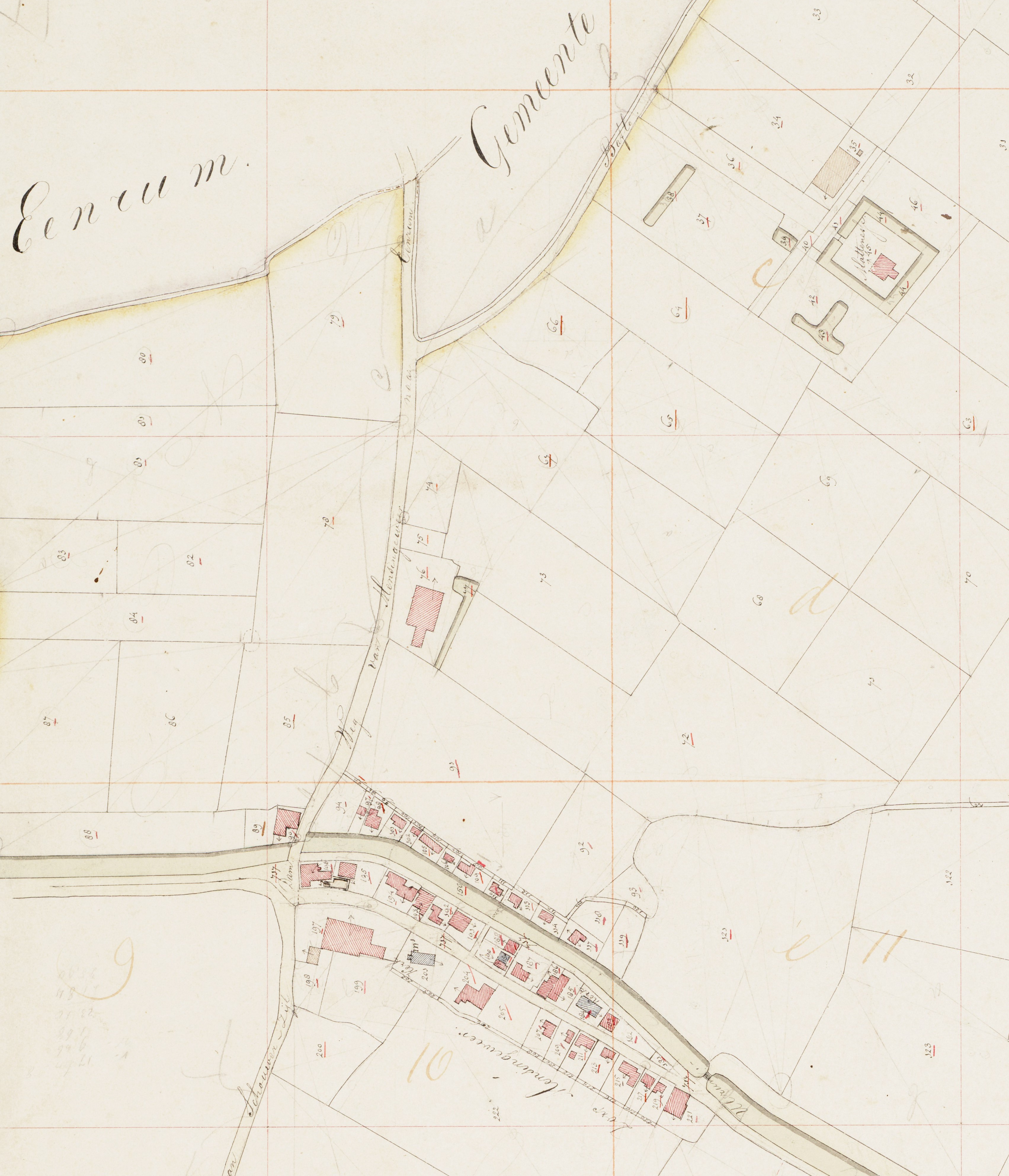 Uitsnede kadasterkaart gemeente Leens - den Hoorn (1832) met onder het dorp Mensingeweer en boven de borg Matenesse.